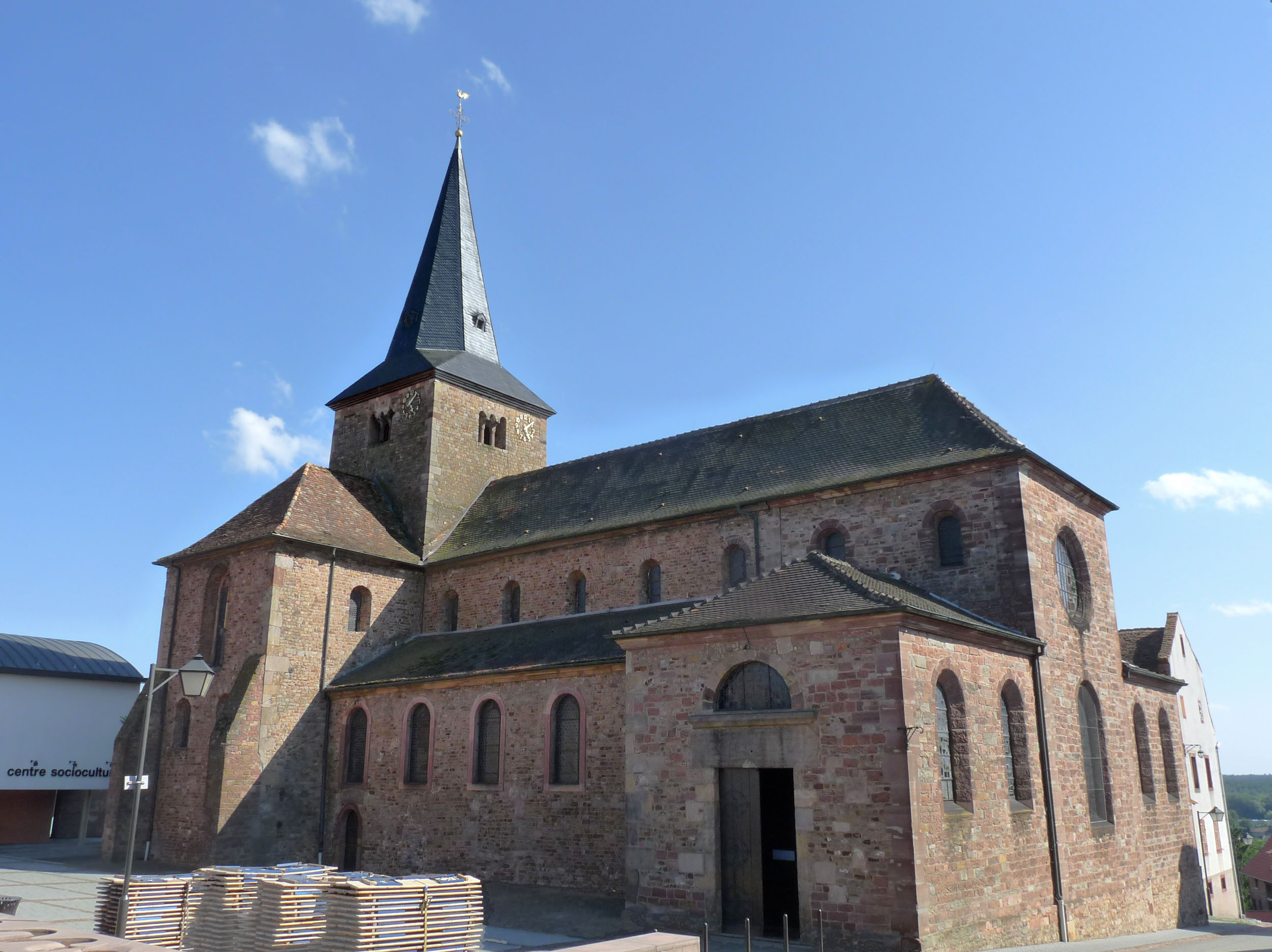 Ancienne abbatiale de Surbourg (Bas-Rhin)